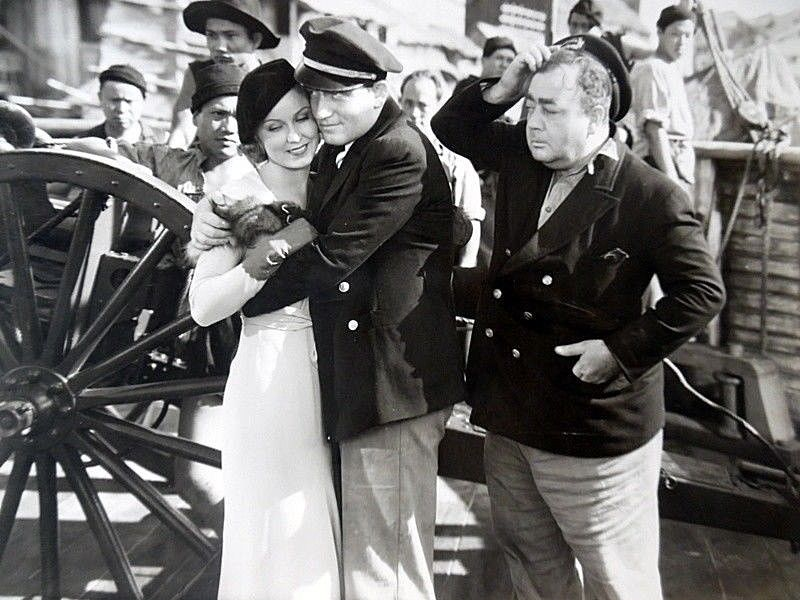 Fay Wray & Spencer Tracy publicity photo for the film Shanghai Madness (1933)